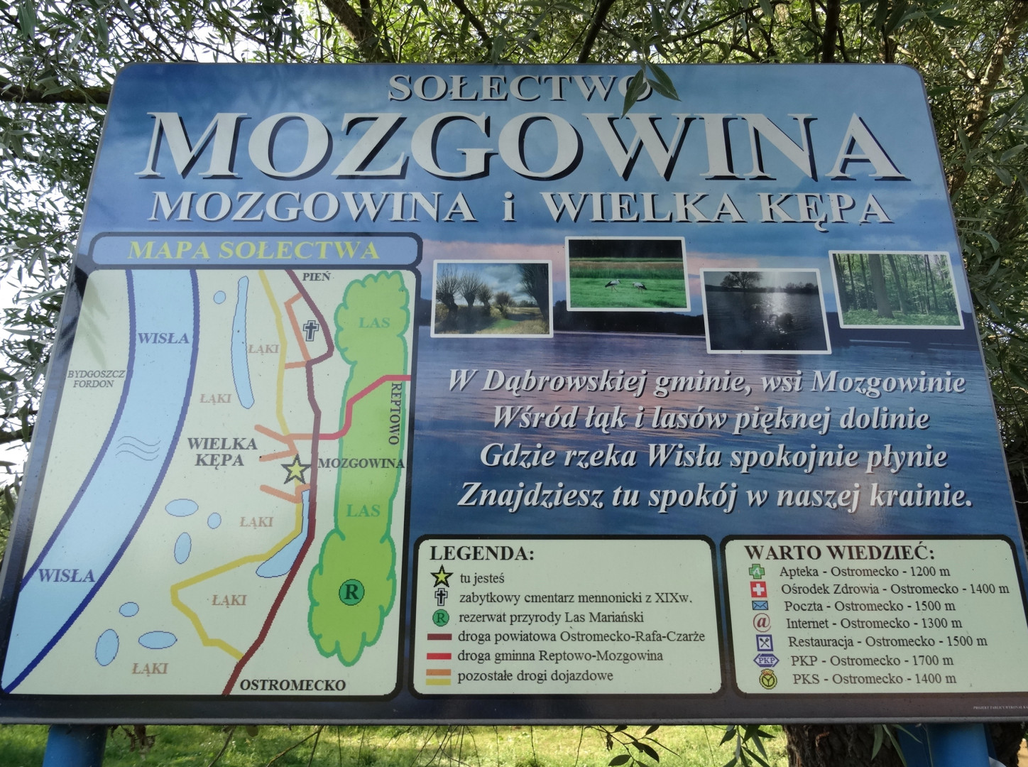 Mozgowina, gmina Dąbrowa Chełmińska